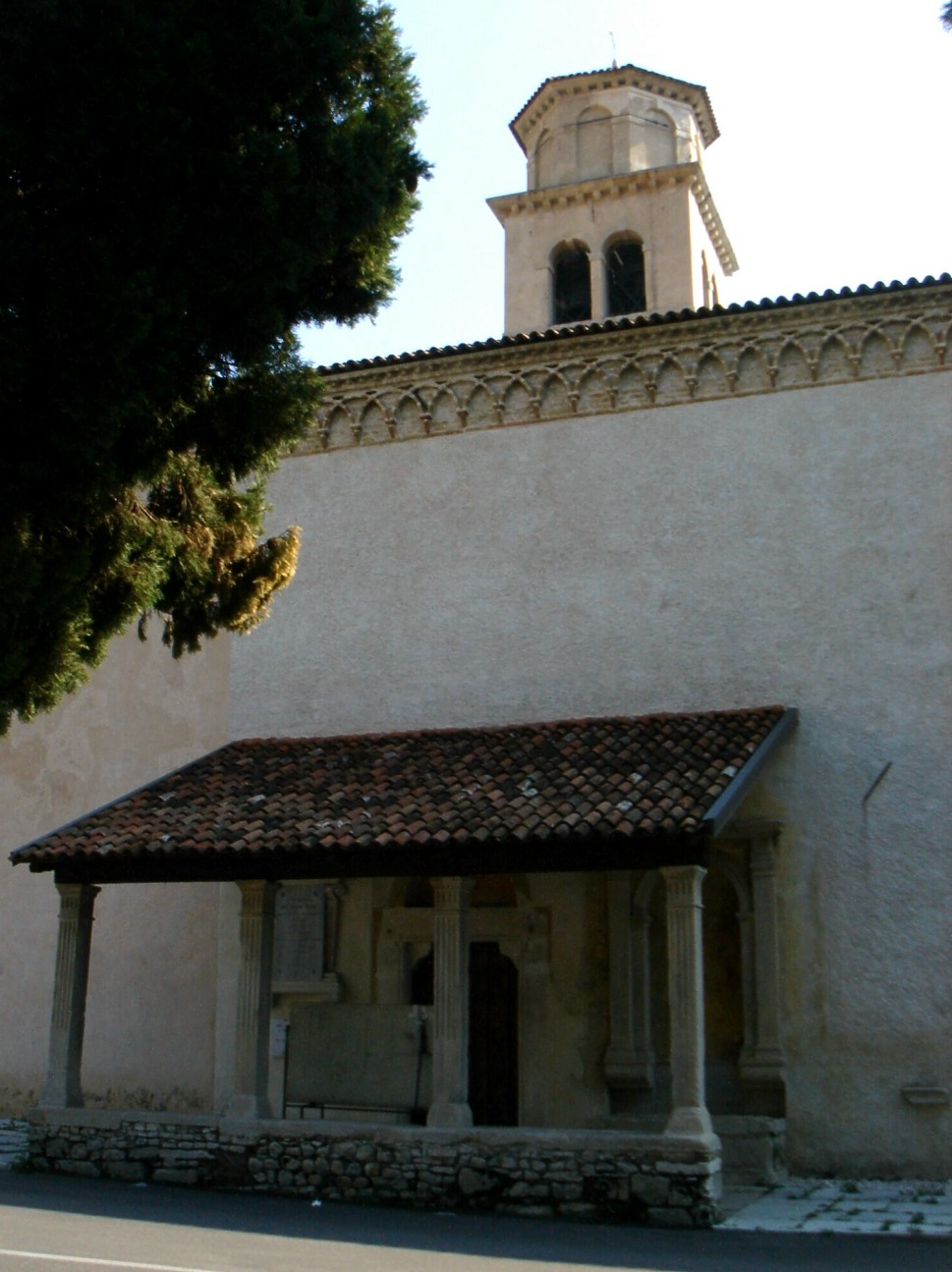 Serravalle di Vittorio Veneto (Treviso): ingresso laterale e campanile dell'antica pieve di Sant'Andrea di Bigonzo (XII secolo).